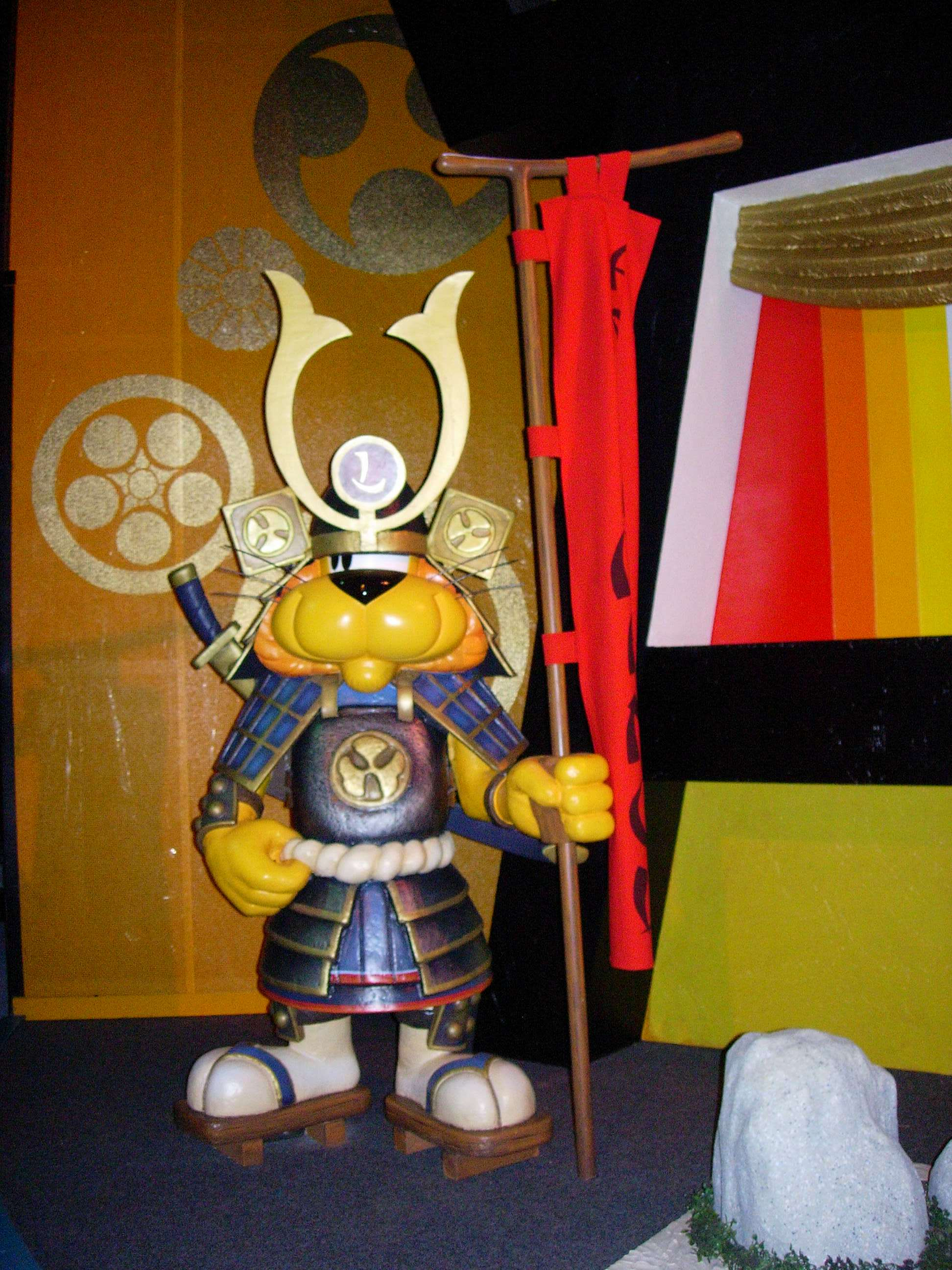 Loeki scène du Japon Carnaval Festival